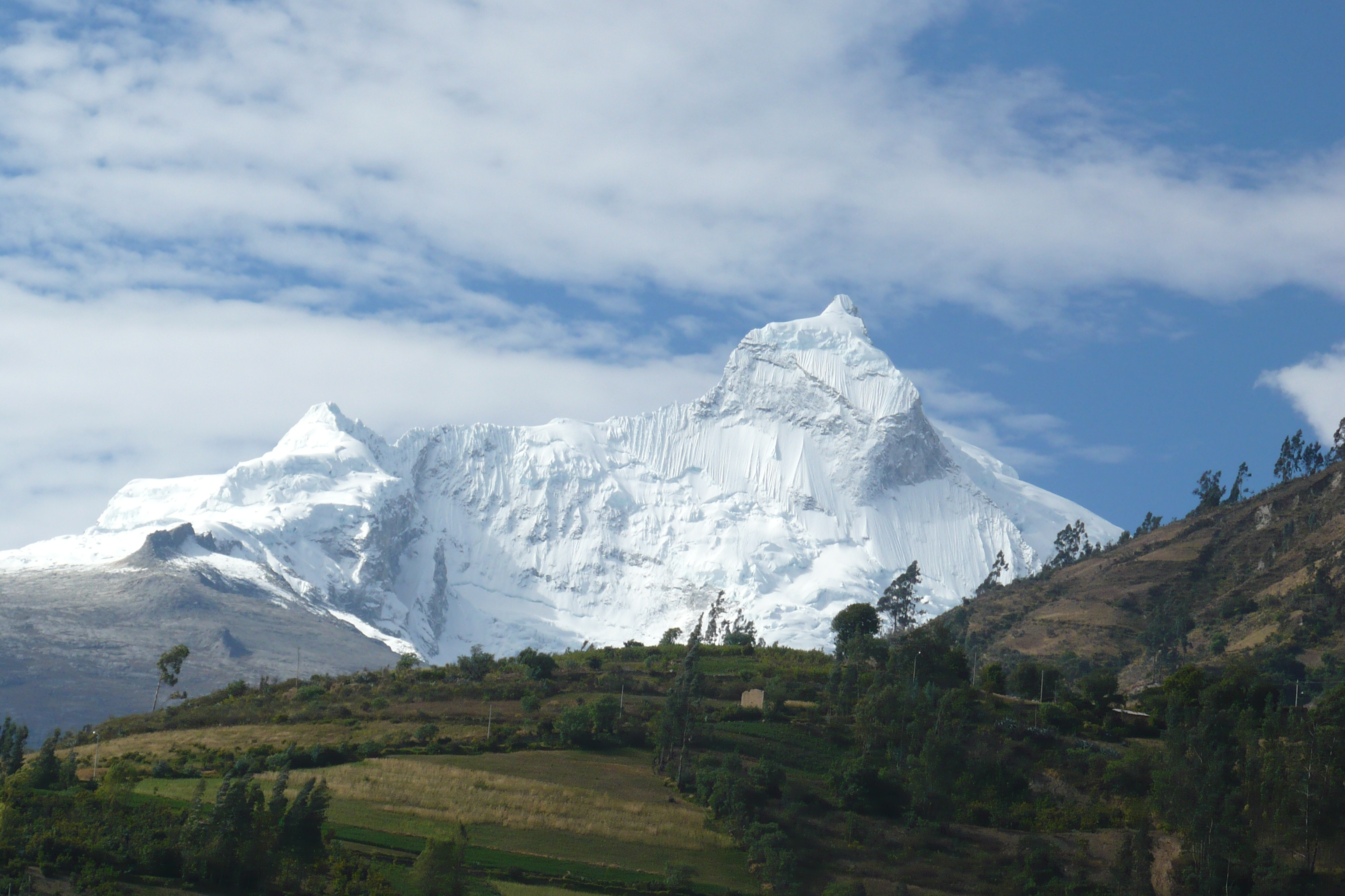 Nevado Huandoy imagen.